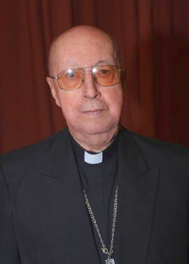 monseñor Hector Rueda Hernandez, arzobispo de Medellín